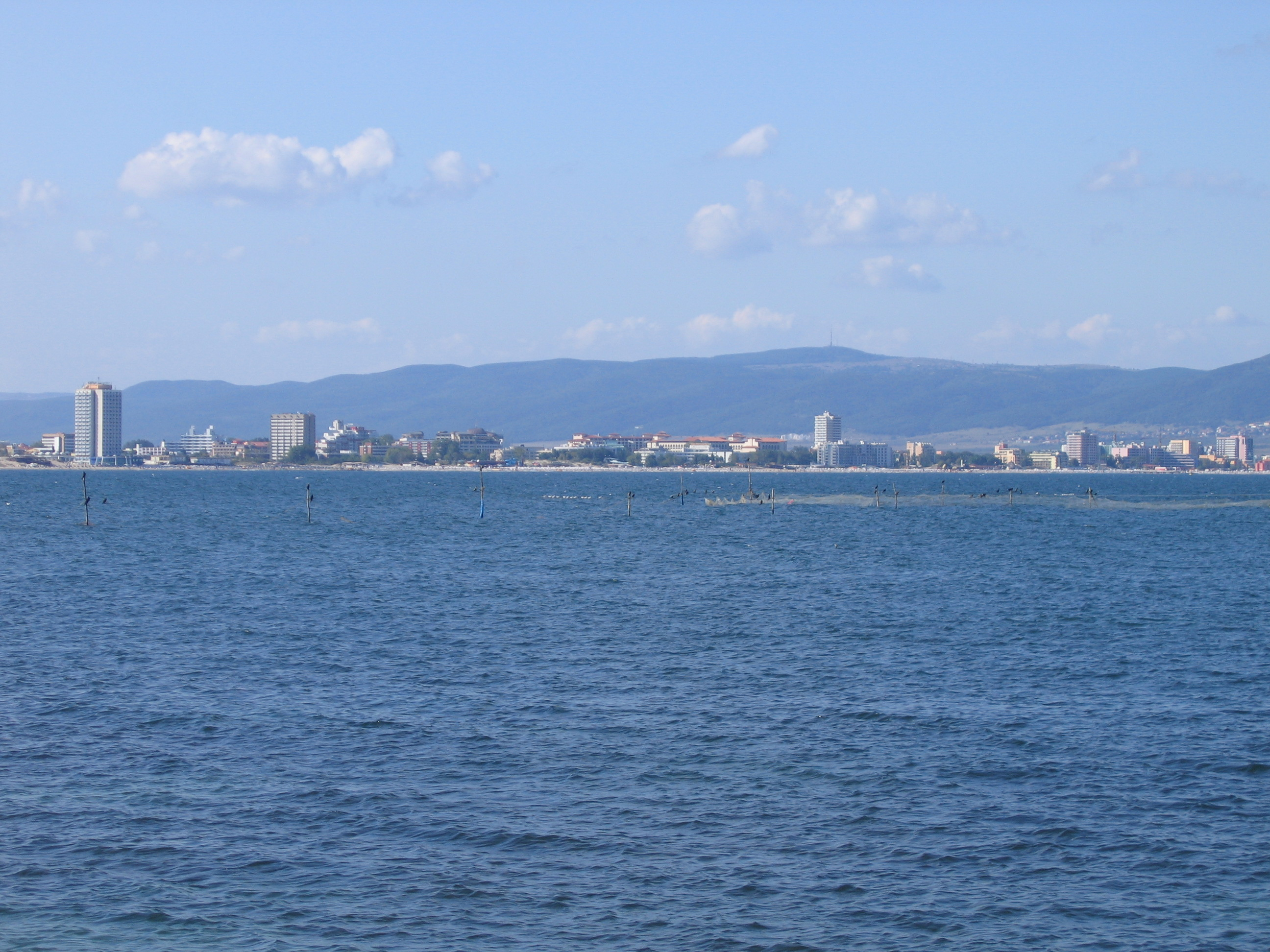 Солнечный берег, вид со стороны Старого Несебра Солнечный берег, Несебр, Болгария